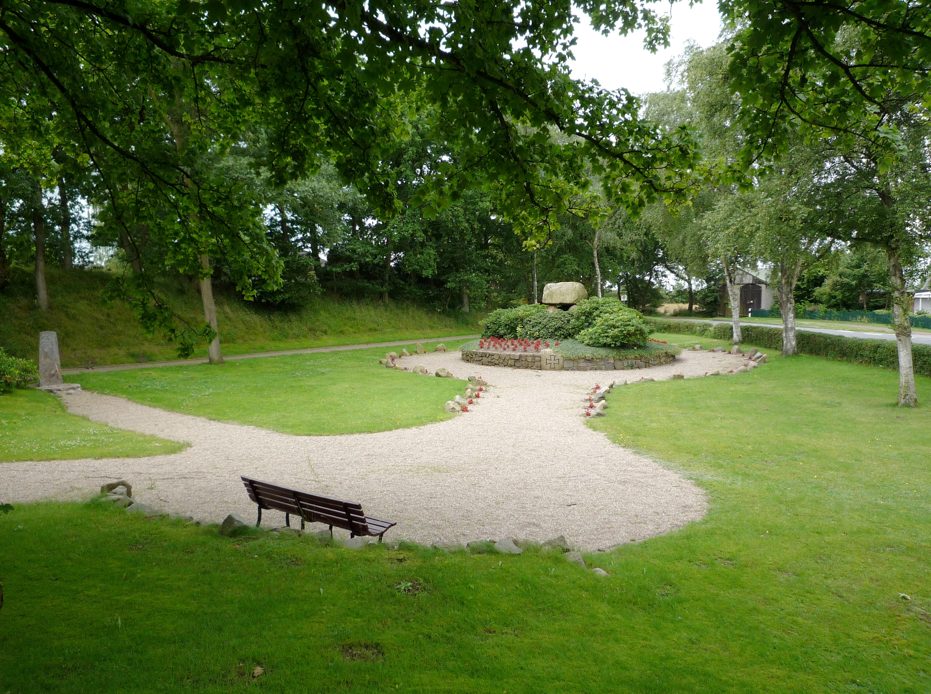 Denkmal für die Weltkriegstoten; an der Dorfstraße in Lürschau